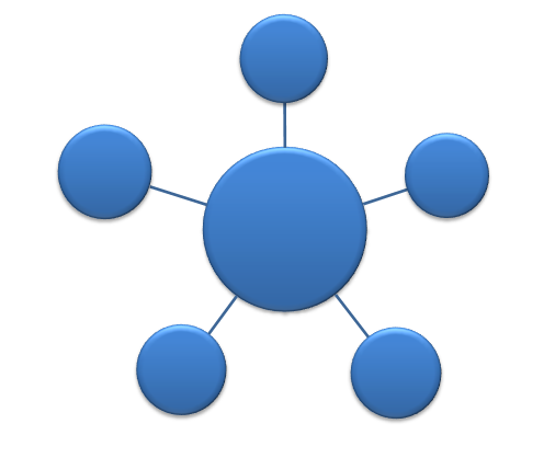 Rysunek przedstawiający aglomerację monocentryczną